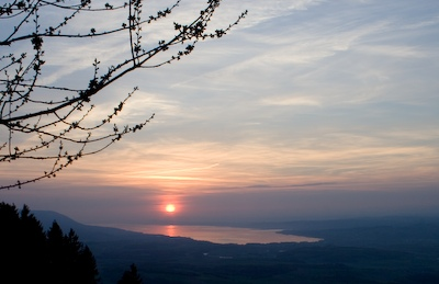 Lever de soleil depuis 1144m la Mathoule/Suchet